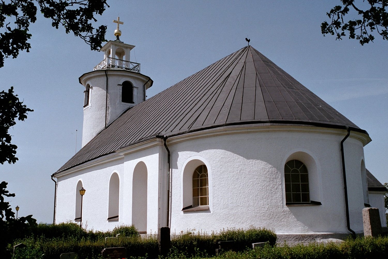 Ökna kyrka